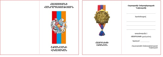 Հայրենիք շքանշանի վկայական